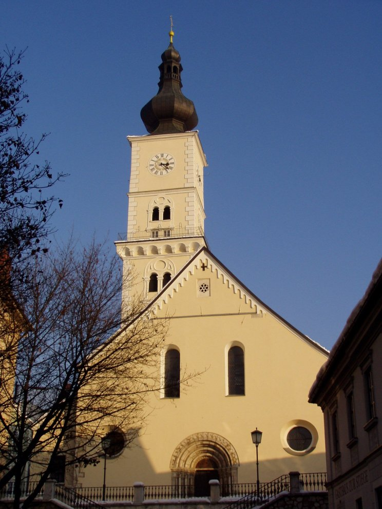 Markuskirche in Wolfsberg, Carinthia